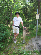 Bilde av Nestleder i Groruddalen Historielag Jan Arne Tangerud ved Pilegrimsvandring på Oldtidsveien i 2007. Arrangert av Groruddalen Historielag.